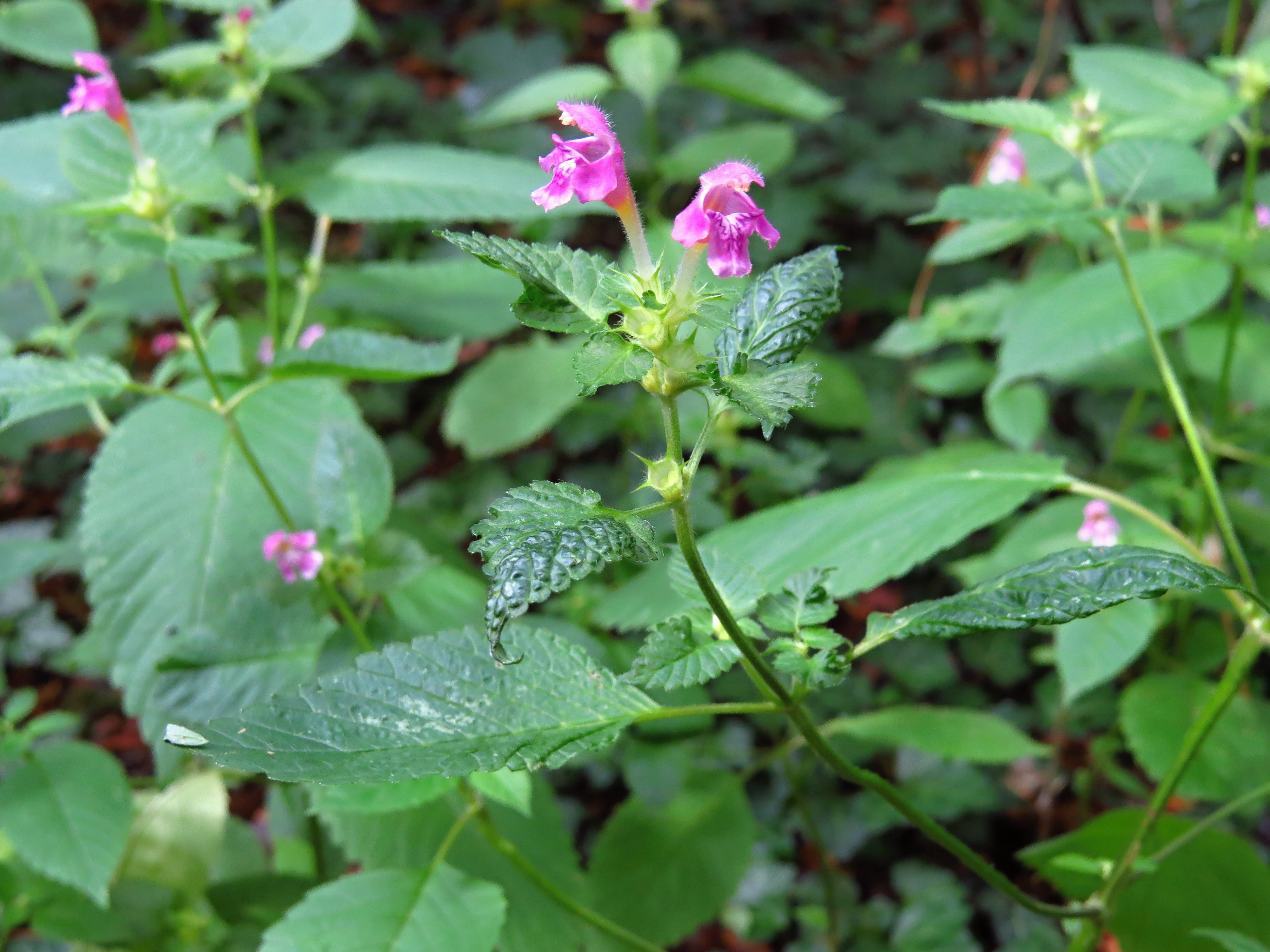 Konopice pýřitá (Galeopsis pubescens) Project: Chráněná území.